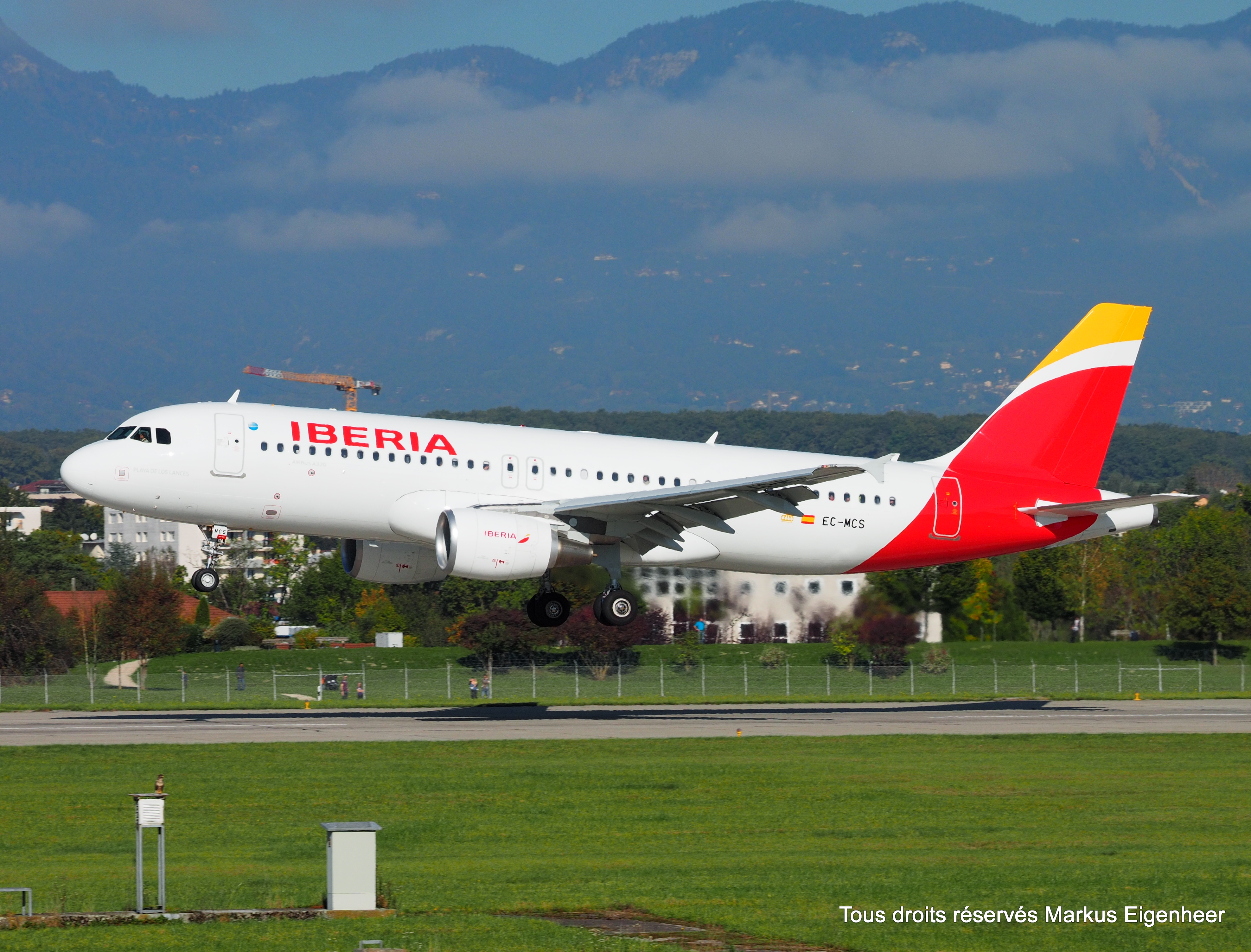 GVA 18.10.2014